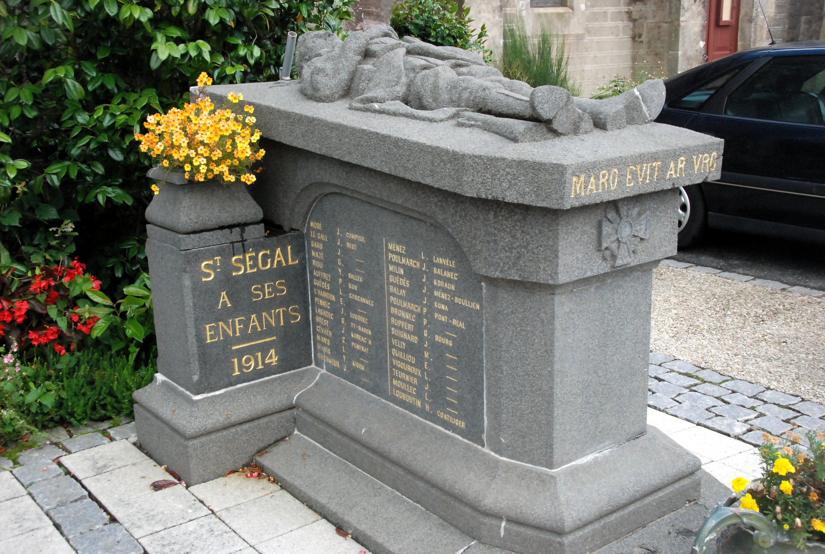 Monument aux morts - Saint-Ségal-29